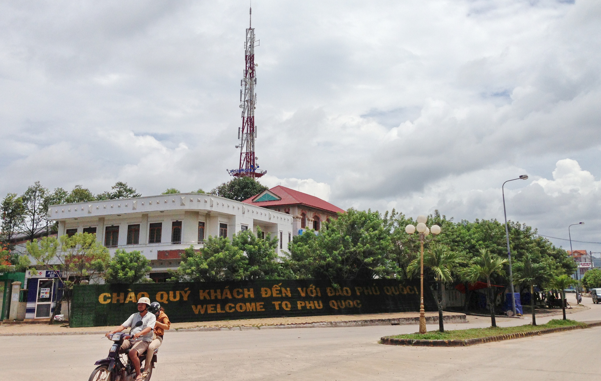 Bưu ĐiệnPhú Quốc- Dương đông, Vietnam